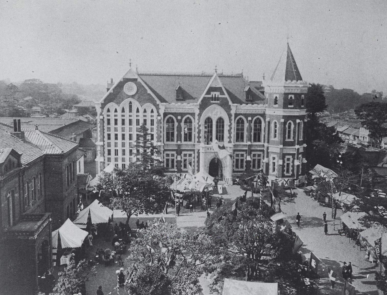 1912年（明治45年）5月、開館式当日の図書館